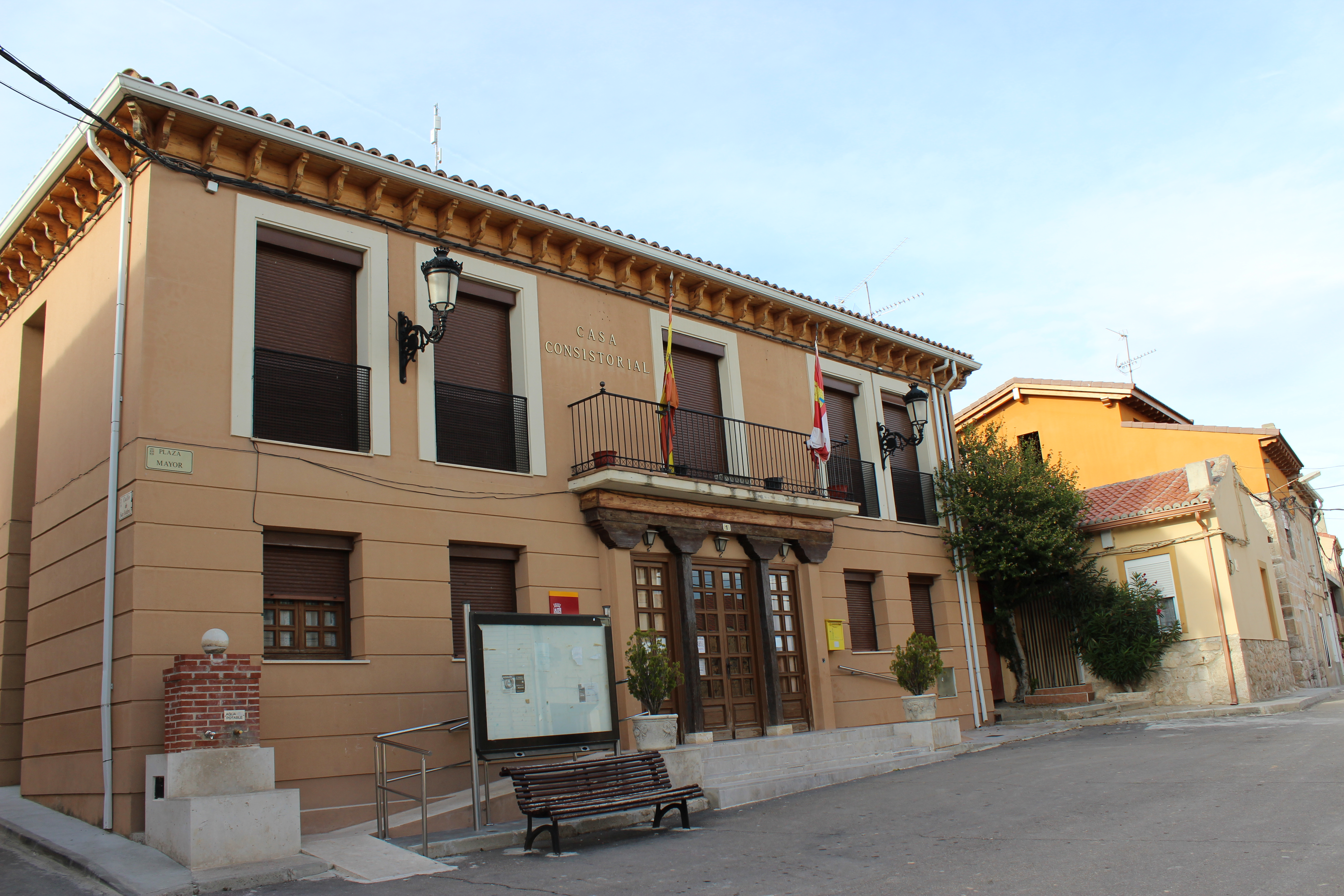 Ayuntamiento de Castroverde de Cerrato